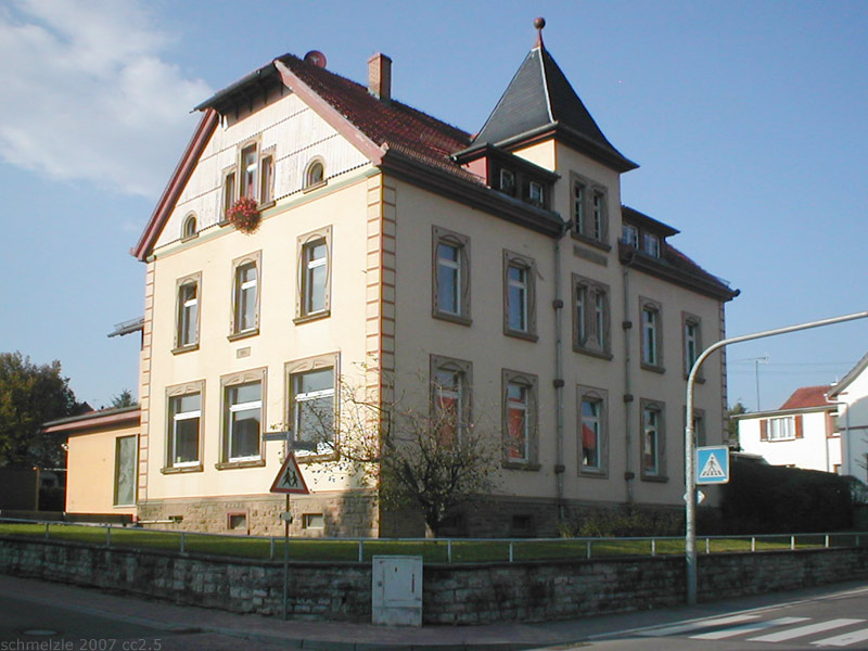 Schulhaus von 1904 in Meckesheim-Mönchzell, Baden-Württemberg, Deutschland